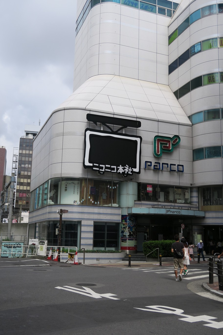 ニコニコ本社（池袋「P'PARCO」内）